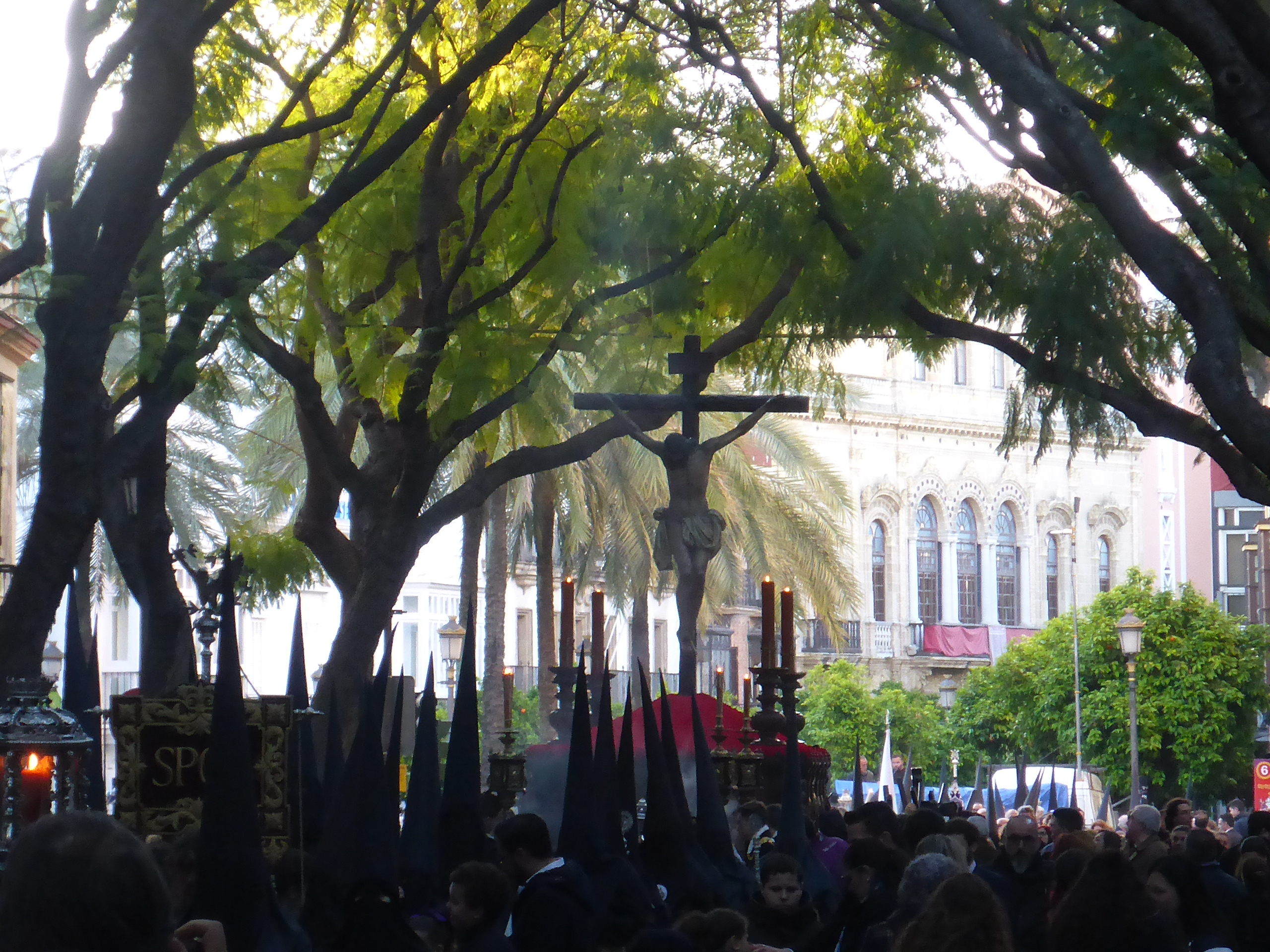 Hermandad de la Buena Muerte (Jerez)